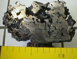 Photo de massiot en coupe